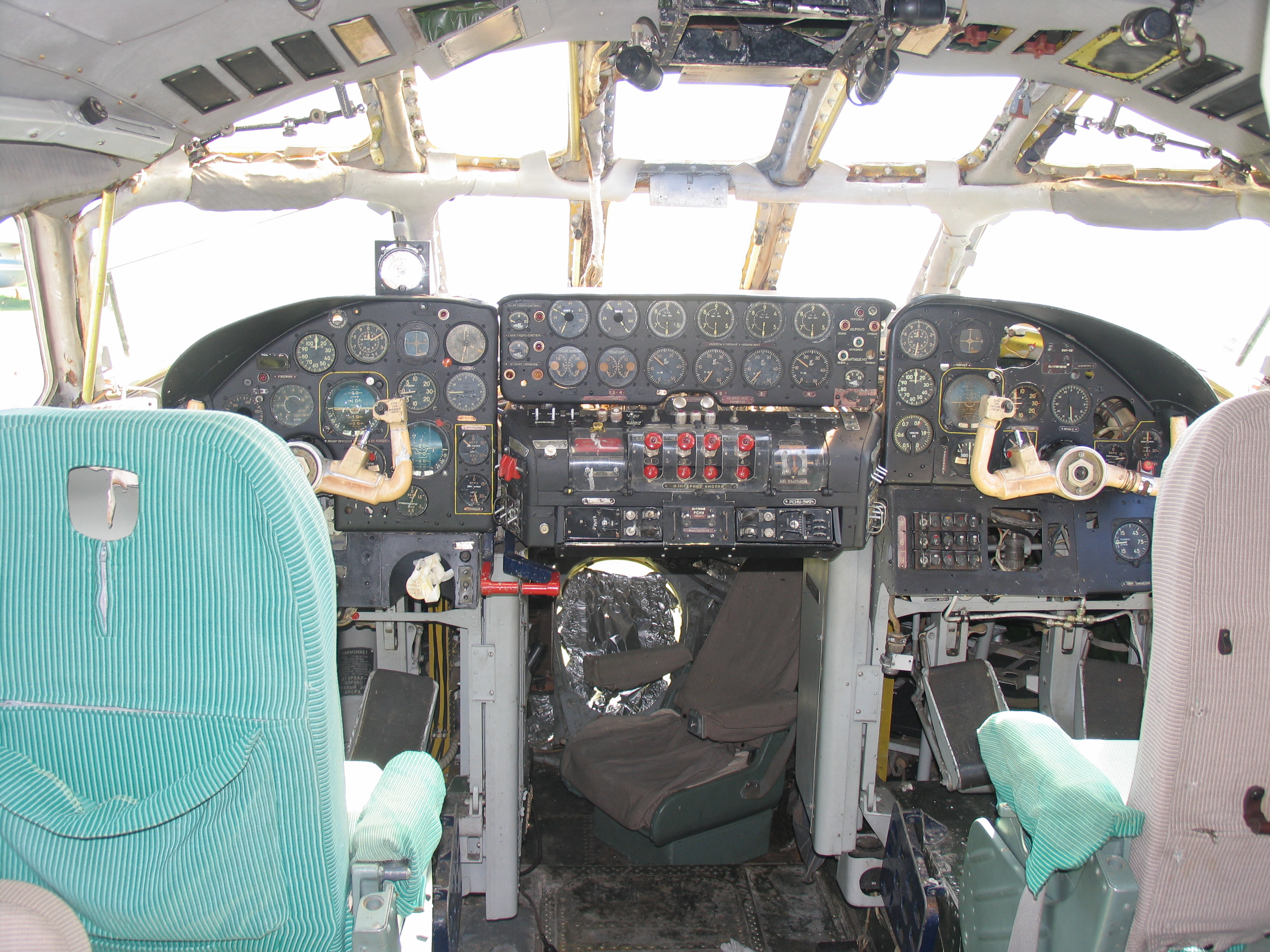 Кабина пассажирского самолёта Ту-114.